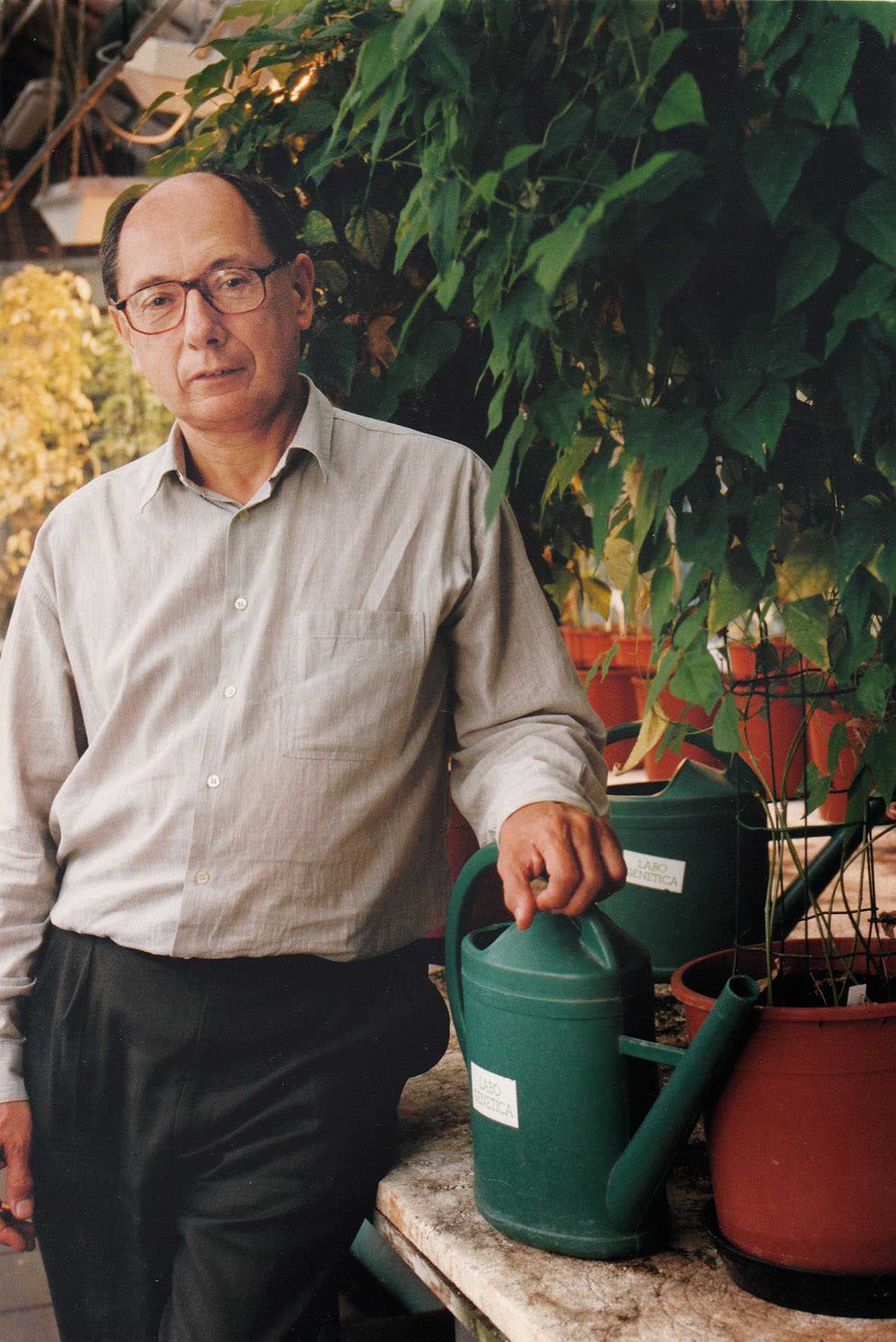 Marc Van Montagu, Belgisch moleculair bioloog.